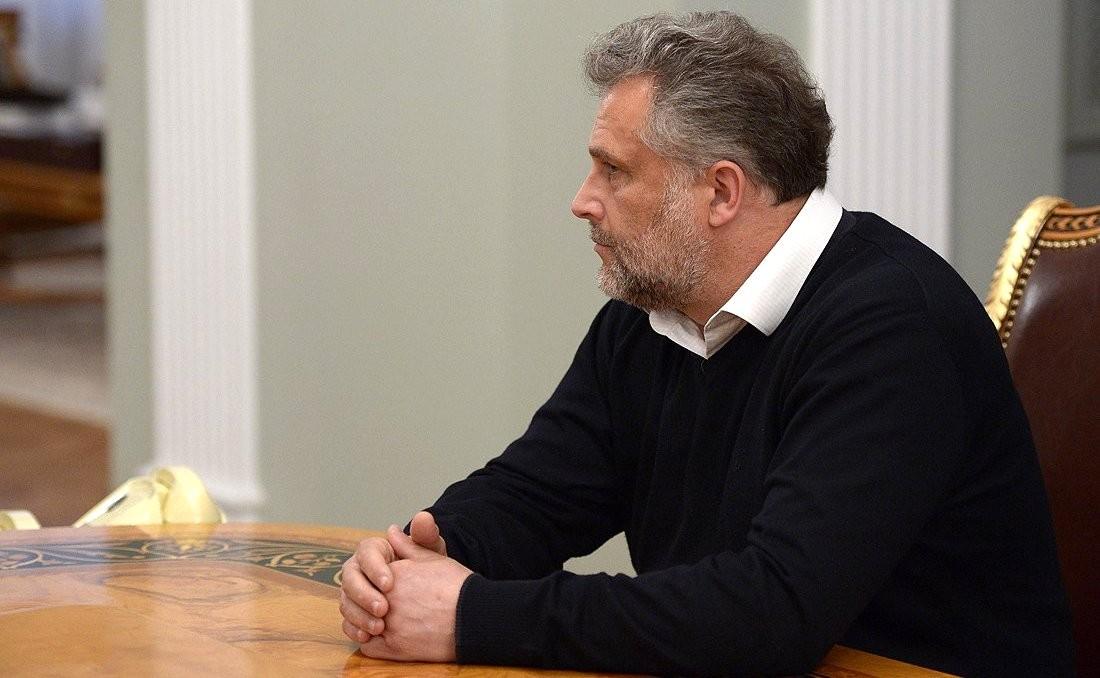 Алексей Чалый